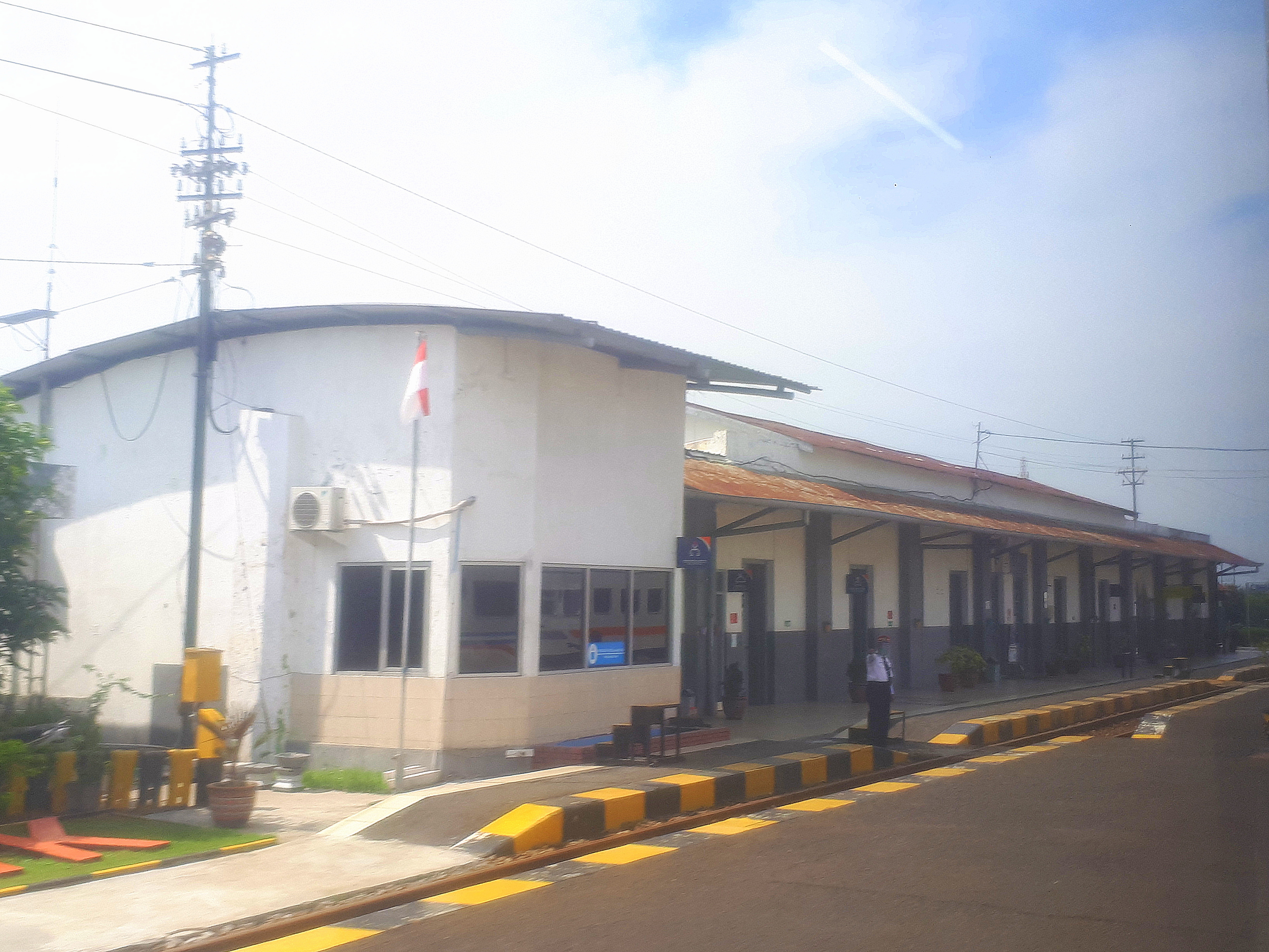 Peron Stasiun Tarik, 2020